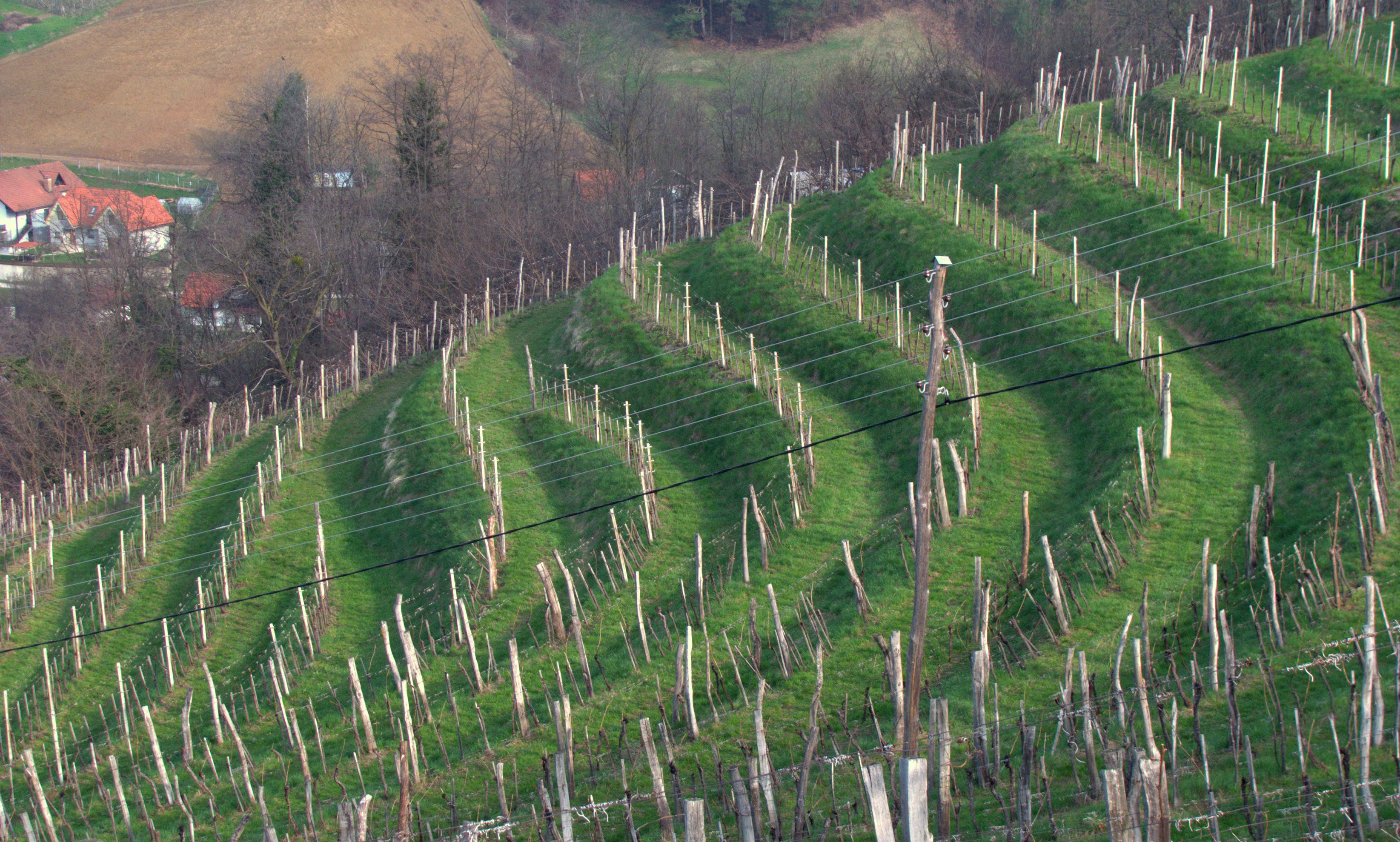 Vinograd pri Hrastju